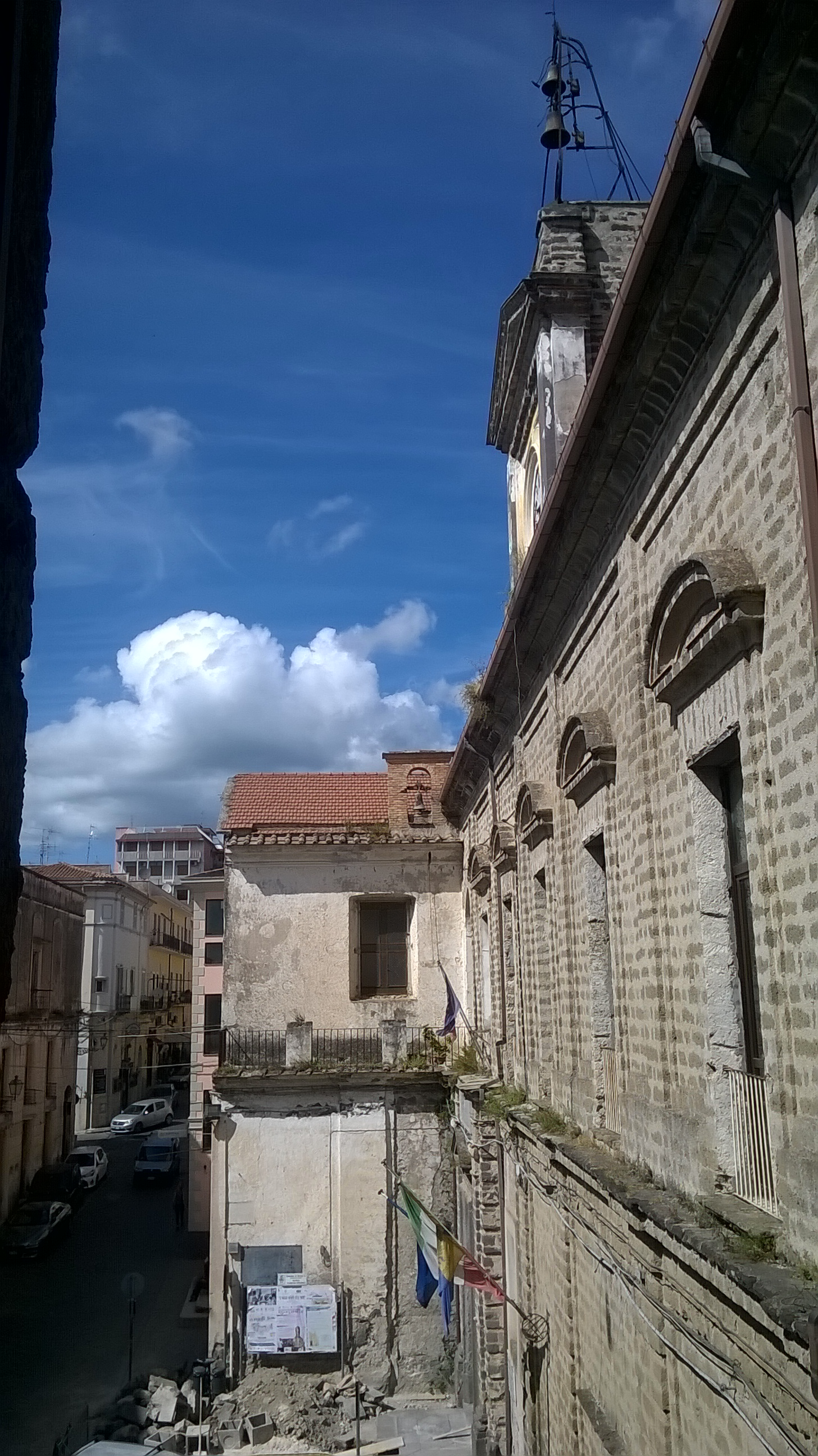 Facciata del "Nifo", visuale dalla biblioteca